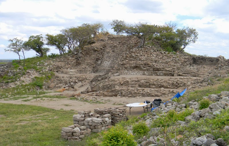 Ruinas de piramide en Teocaltitlan